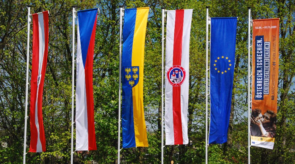 Flaggen bei der Niederösterreichischen Landesausstellung 2009 in Raabs an der Thaya (Niederösterreich)